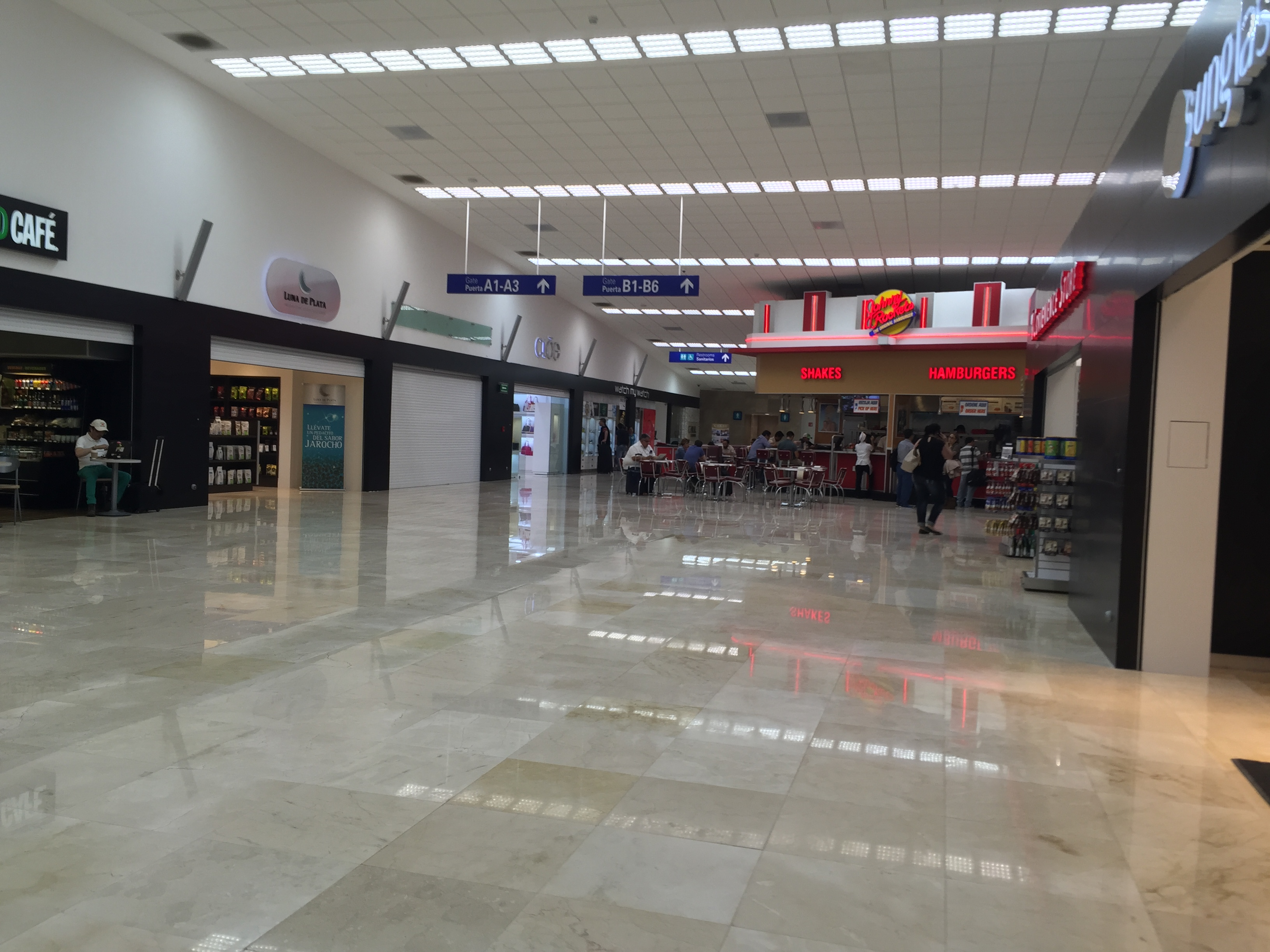 Comercios en el Aeropuerto Internacional de Veracruz.